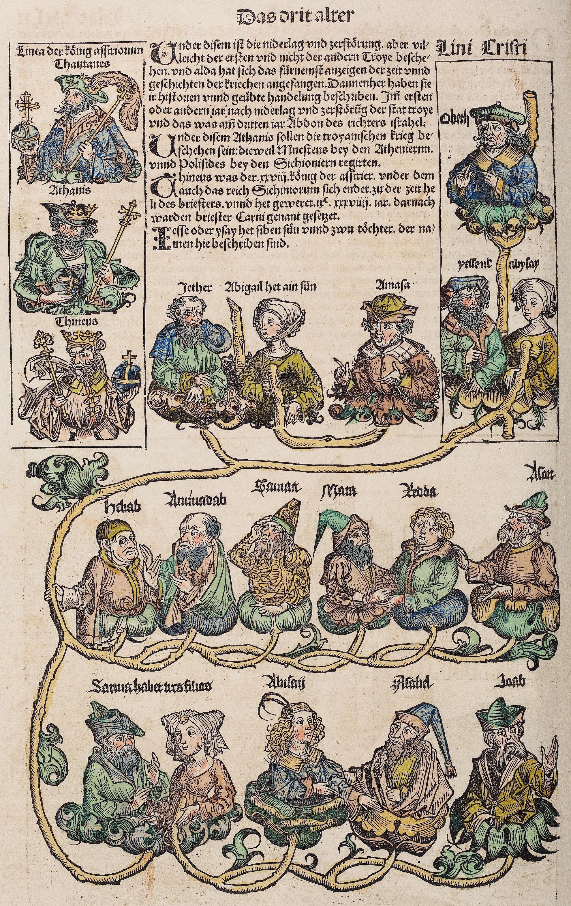 Darstellung der Familie Isais aus der Schedelschen Weltchronik, fol. 42v (Nürnberg 1493).